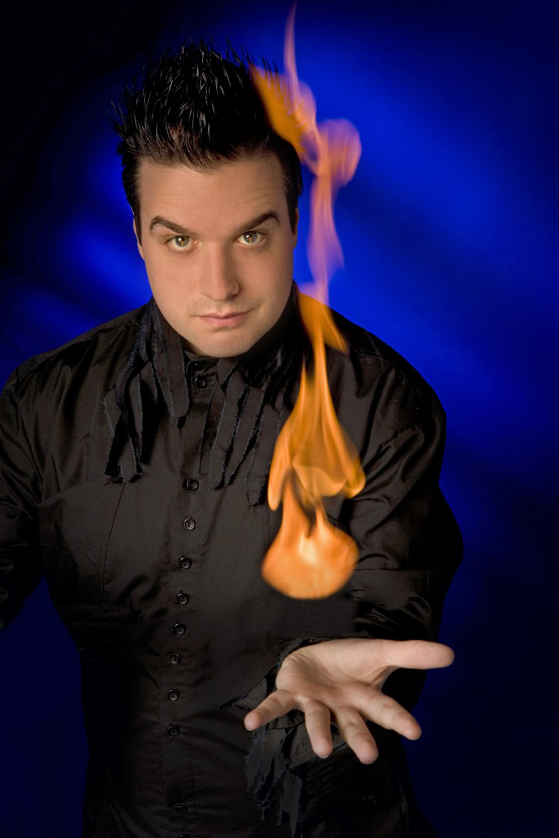 magic